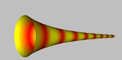 Trompette de Gabriel construite avec POV-Ray